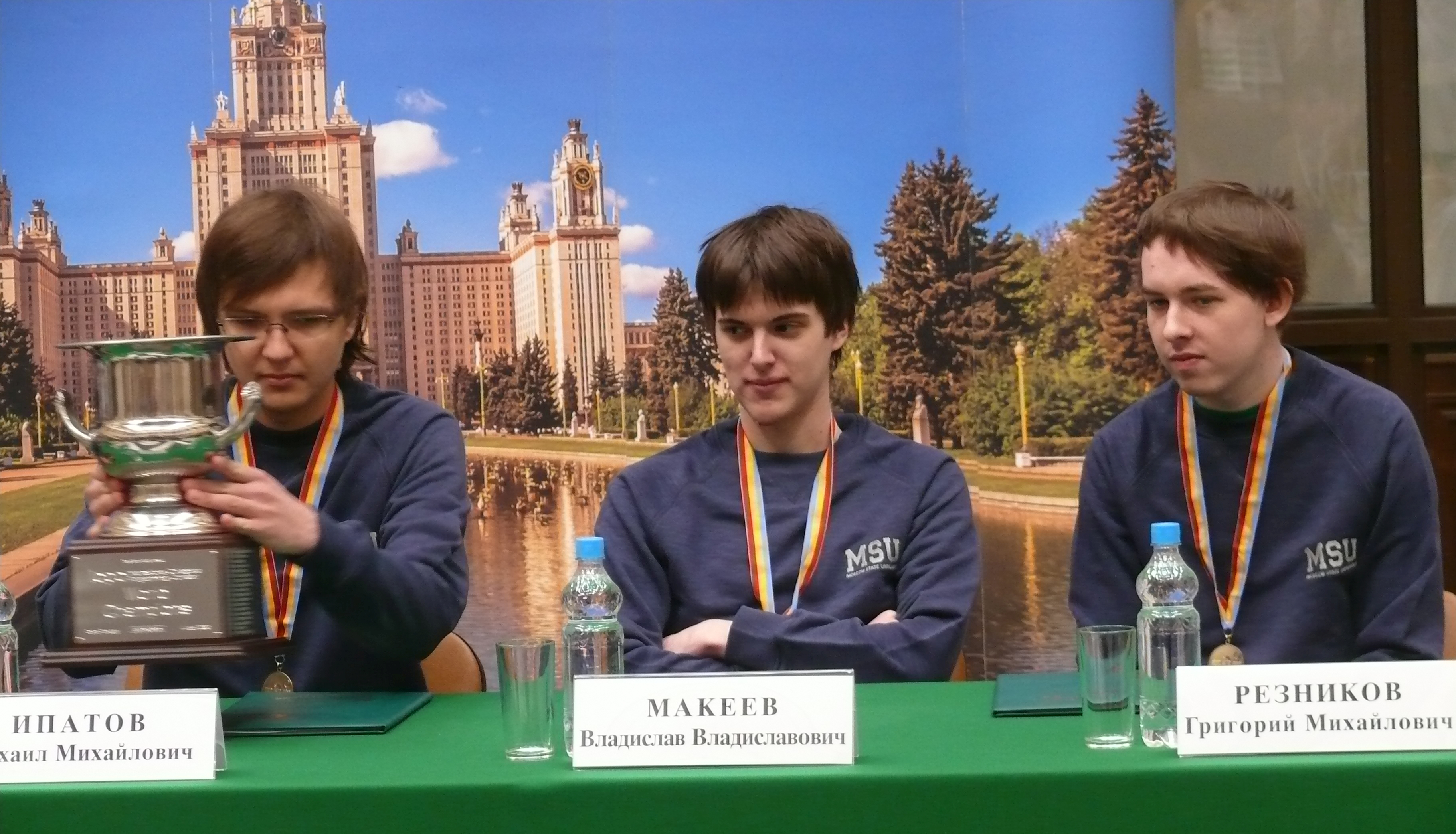 Команда МГУ - чемпионы ICPC 2019 и 2018: Михаил Ипатов, Владислав Макеев, Григорий Резников.